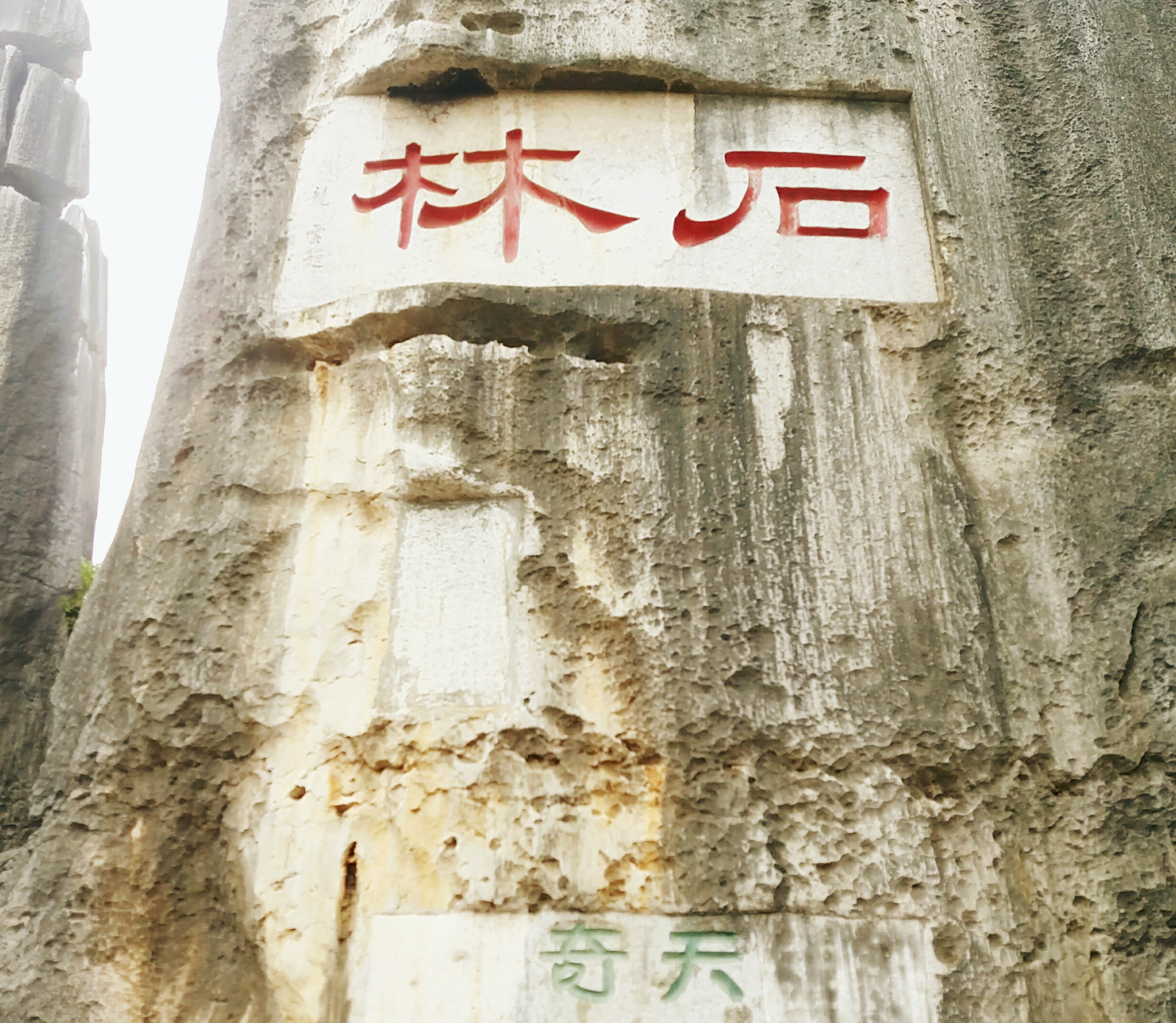 წარწერა შილინის ქვის ტყის მთავარ შესასვლელზე